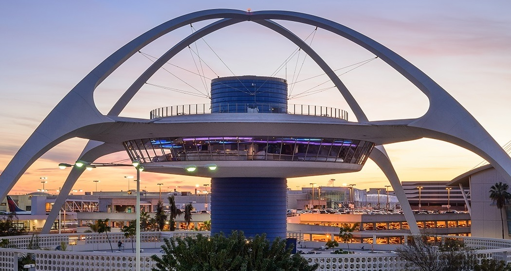 Edifício Temático em Los Angeles, Califórnia